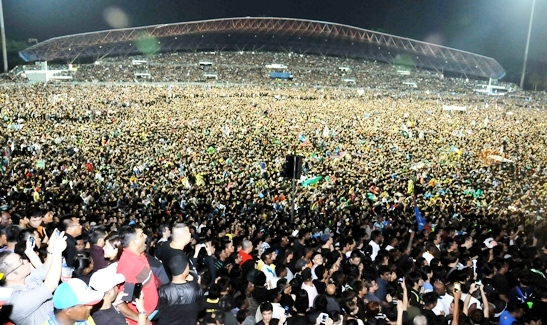 505 Himpunan Suara Rakyat di Kelana Jaya, 2013/05/08